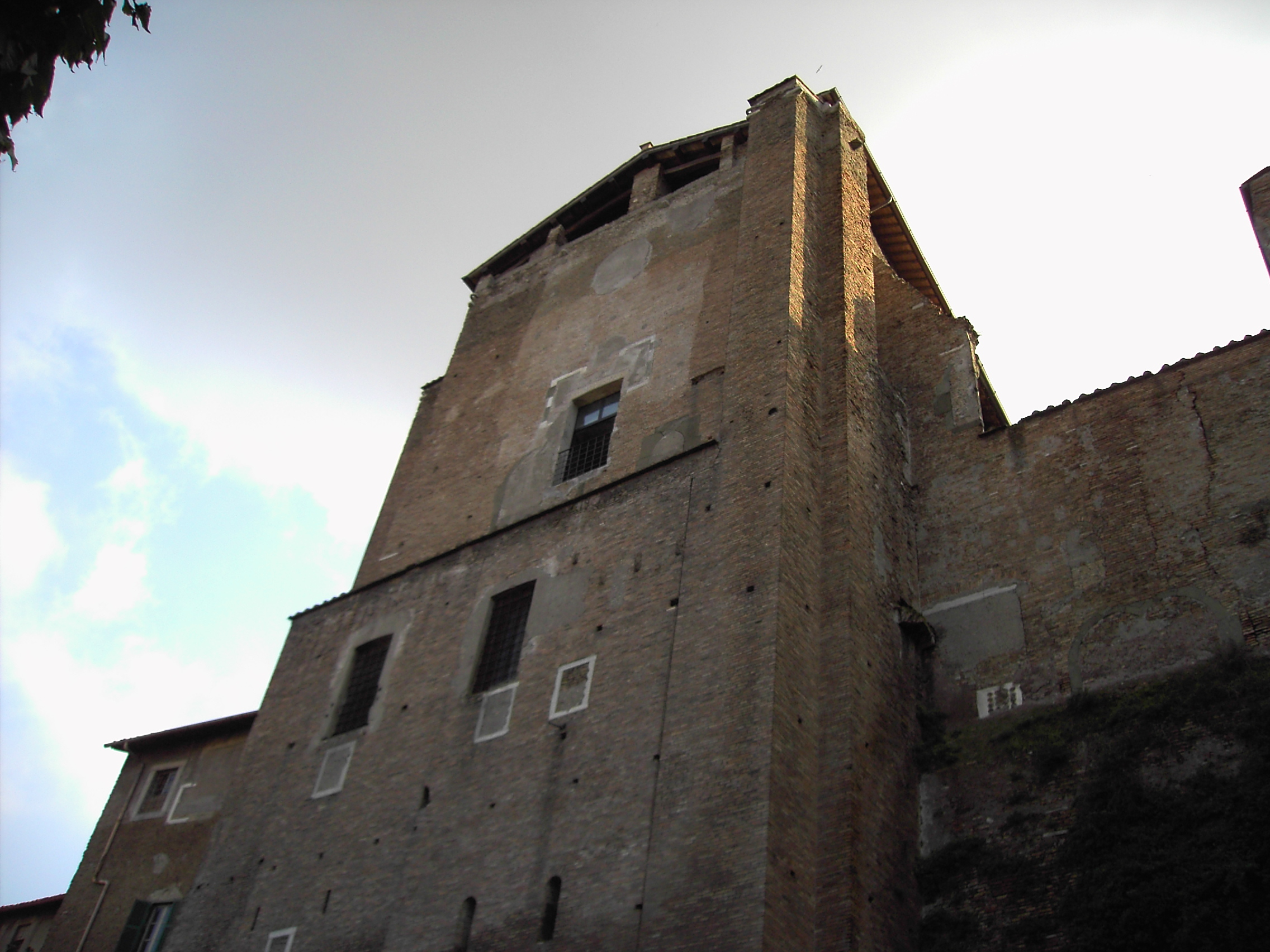 Roma, Monastero Santi Quattro Coronati: la torre verso via dei Santi Quattro